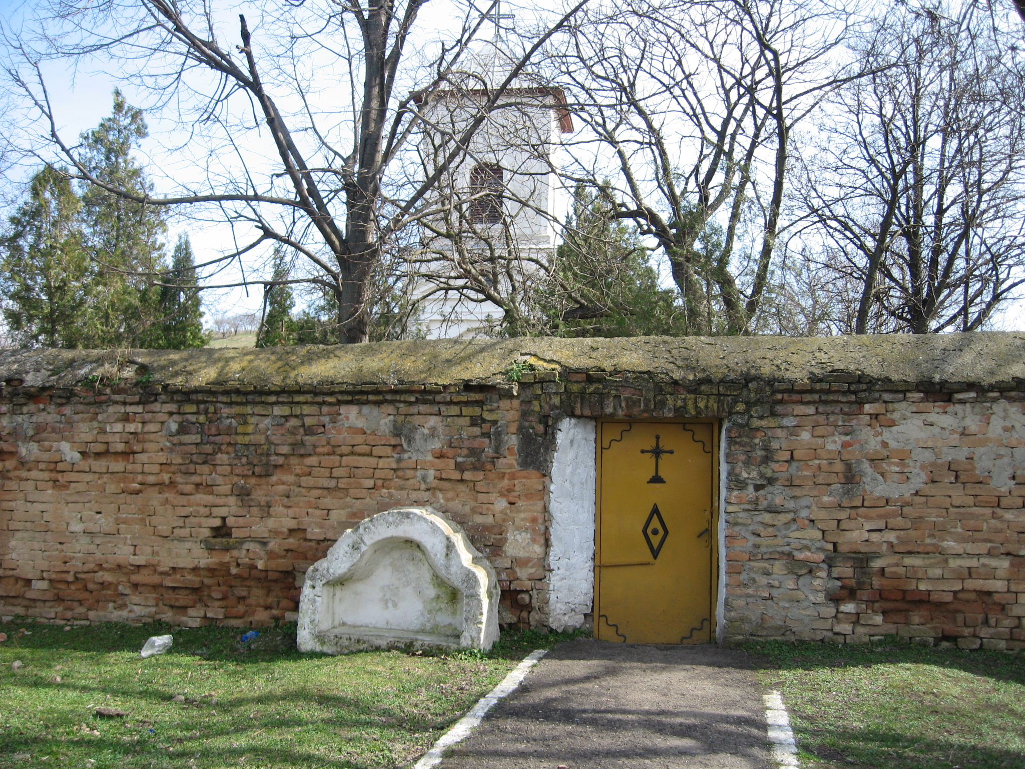 Conacul din Soleşti 03